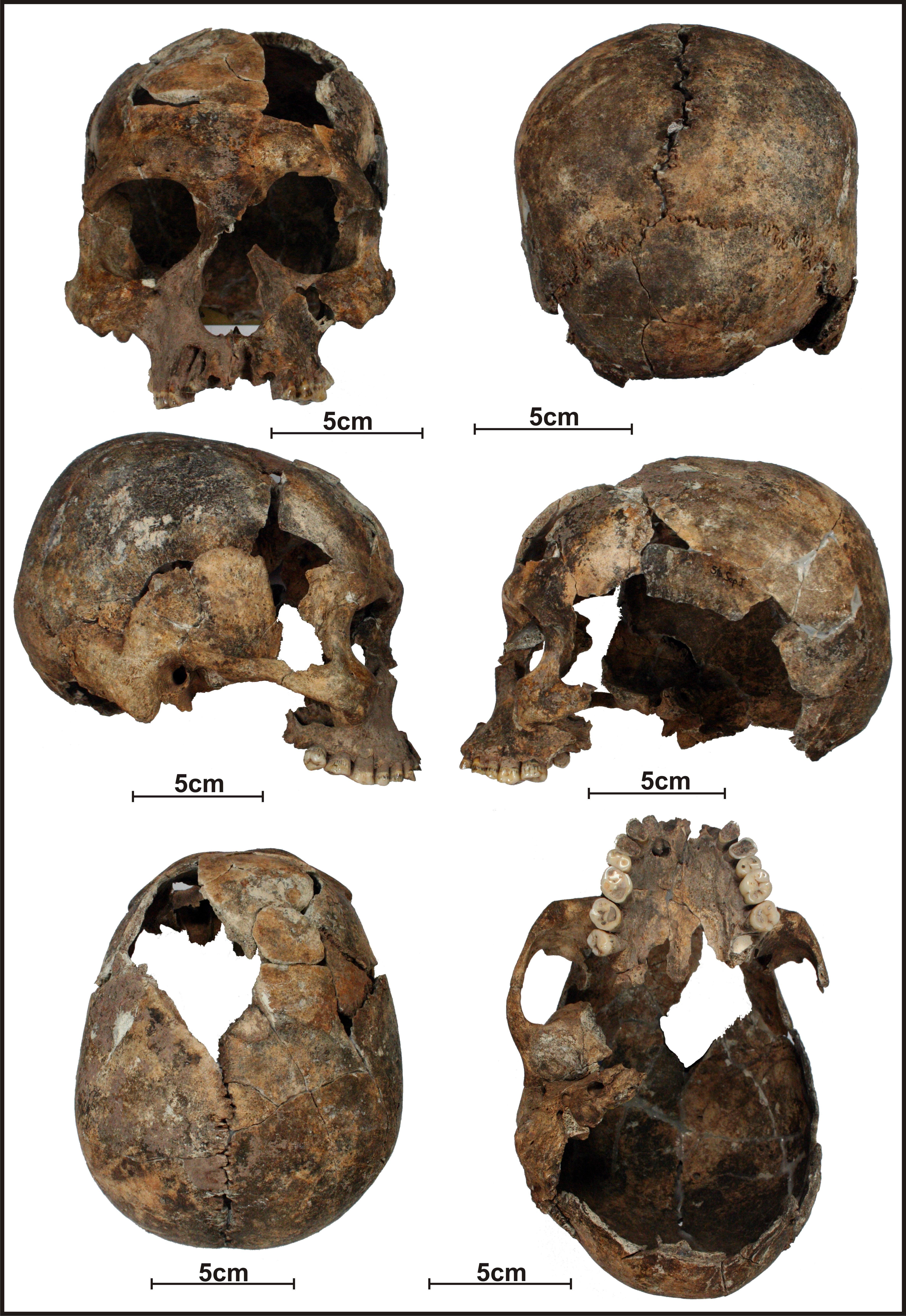 Lapa do Santo - Sepultamento 01 - Crânio